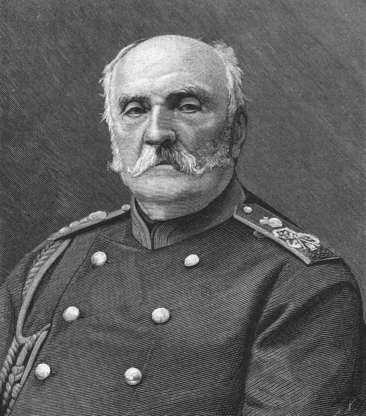 Генерал Гильденштуббе Александр Иванович, около 1880 года